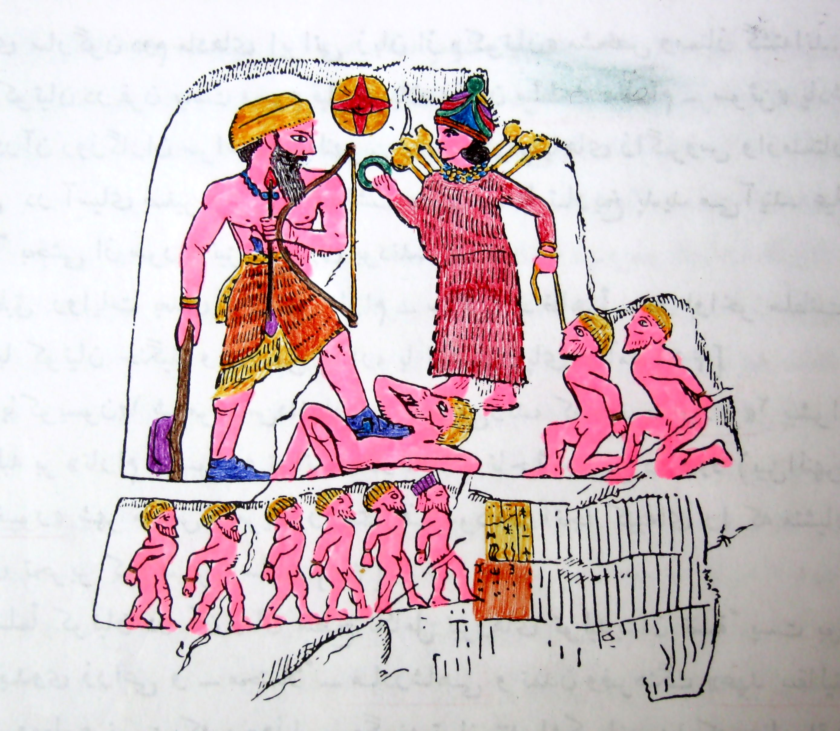 گرته‌ای آنوبابانی‌نی ملکه لولوبیان از نقش برجسته سرپل‌ذهاب. نیمهٔ دوم هزارهٔ سوم پیش از میلاد